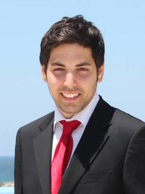 תמונה - נאור ביטון